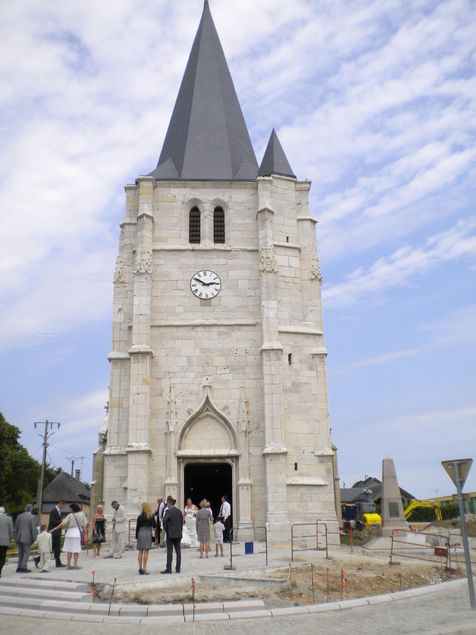 Amfreville-la-Campagne 10,07,2010